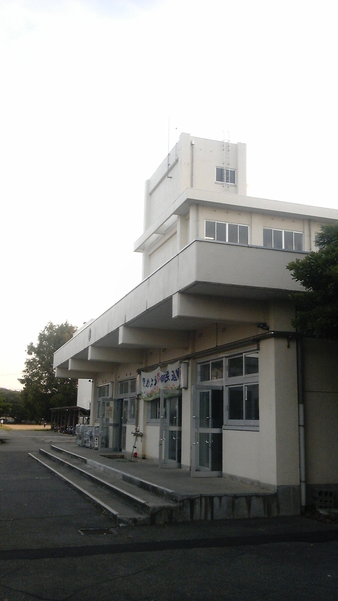 生徒玄関の様子